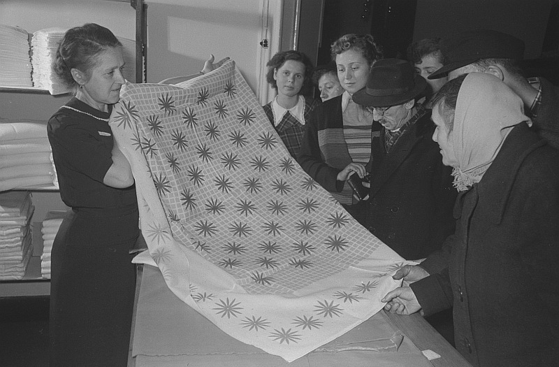 Original image description from the Deutsche Fotothek Eine Verkäuferin präsentiert Kunden eine Tischdecke